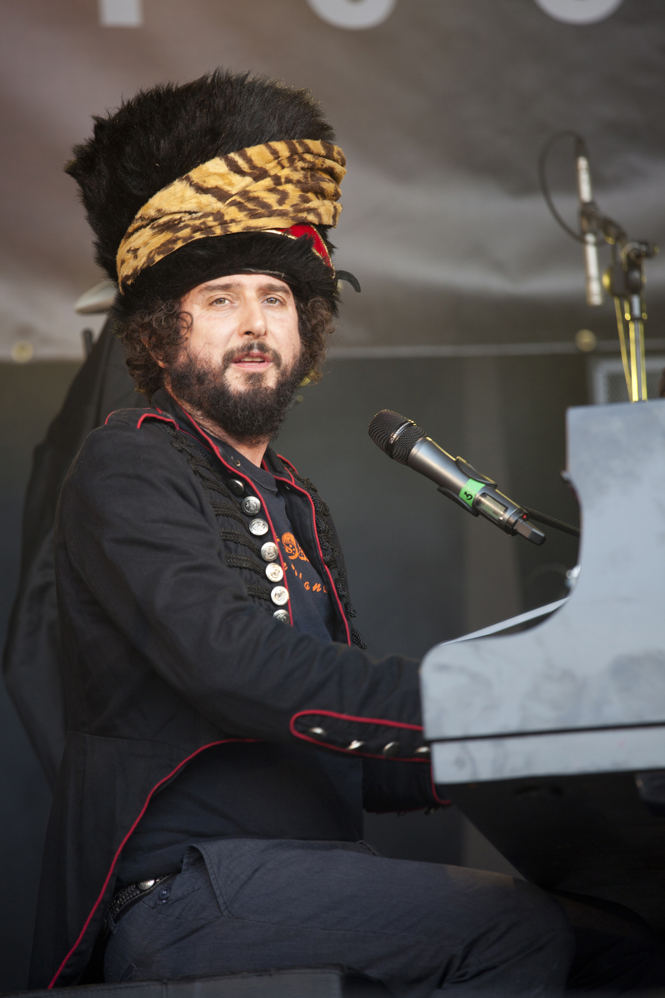 Vinicio Capossela - Cruïlla 2010